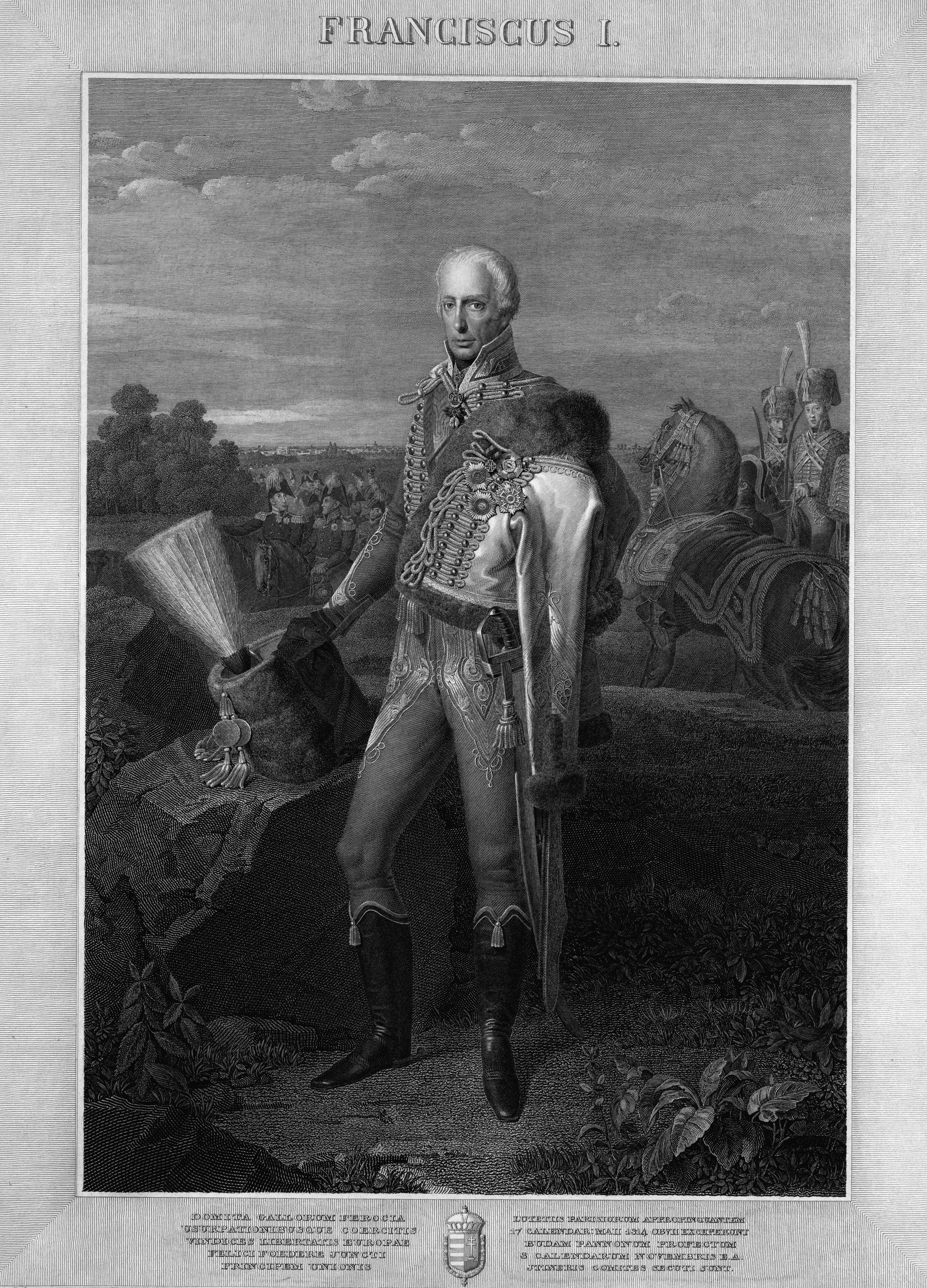 Habsburg–Lotaringiai Ferenc József Károly osztrák főherceg (Erzherzog Franz Joseph Carl von Österreich) (Firenze, 1768. február 12. – Bécs, 1835. március 2.), a Habsburg–Lotaringiai-ház toszkánai ágából származó osztrák főherceg, József nádor testvérbátyja. 1792-től Ausztria uralkodó főhercege, Ferenc néven magyar király, II. Ferenc néven német-római császár és cseh király, majd 1804-től I. Ferenc néven osztrák császár.